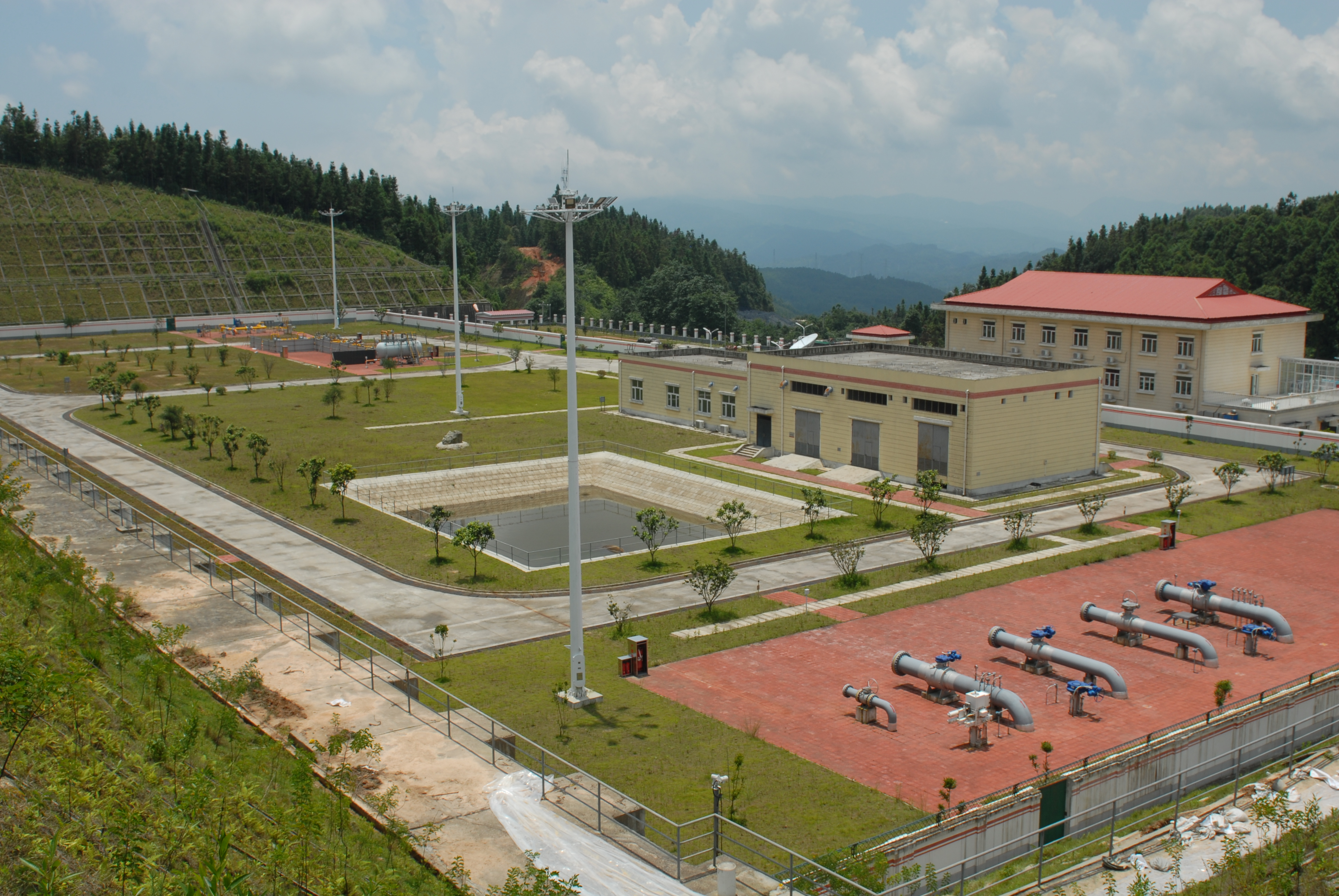 中缅油气管道工程龙陵分输（泵）站